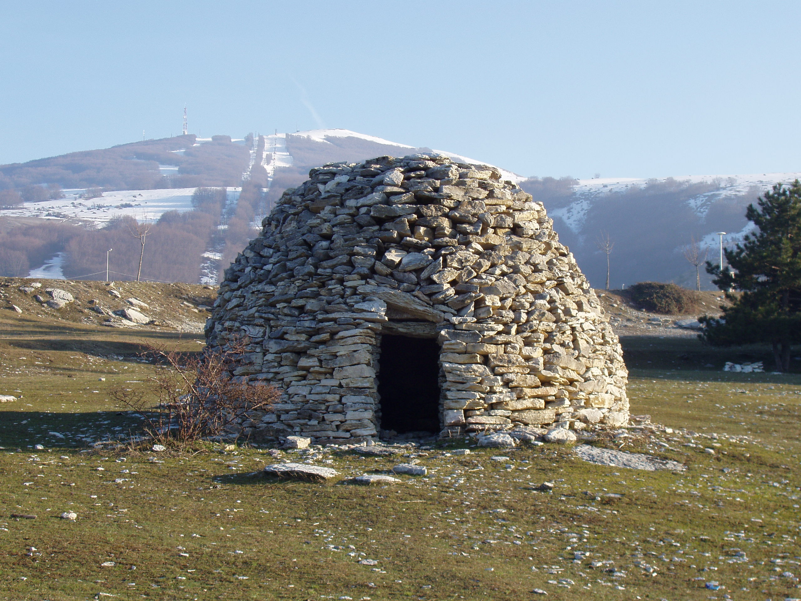 Lucio De Marcellis, foto personale, Caciara tipica capanna a tholos sulla Montagna dei Fiori, GFDL